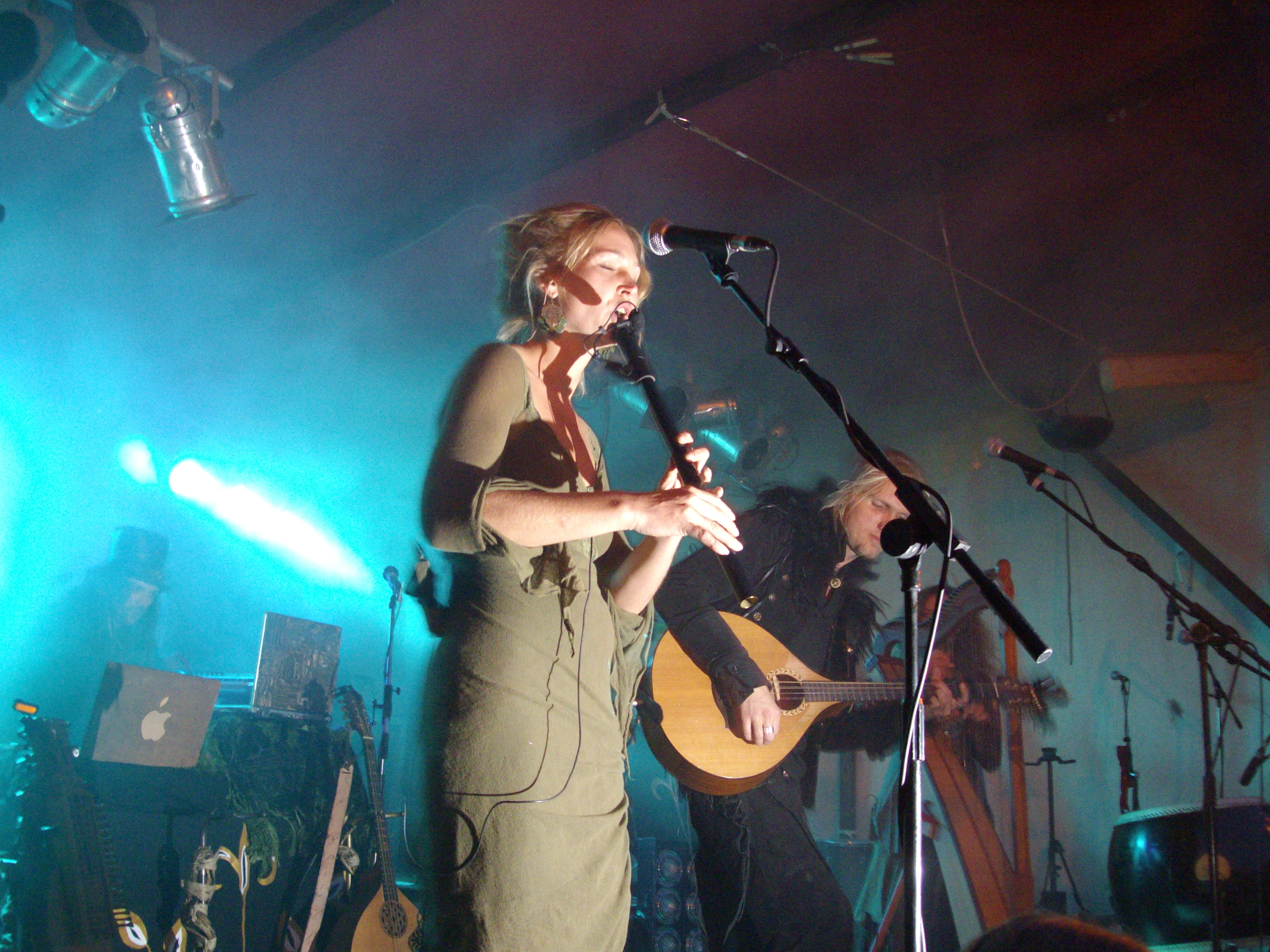 Faun auf dem Mittelalterlich Phantasie Spectaculum in Gelsenkirchen